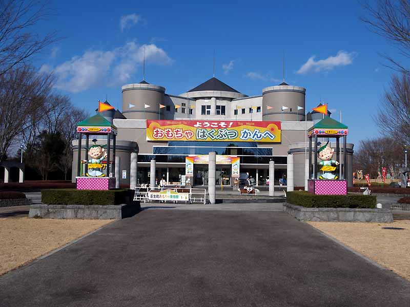 壬生町おもちゃ博物館の正面外観。2007年1月8日Comyu撮影。